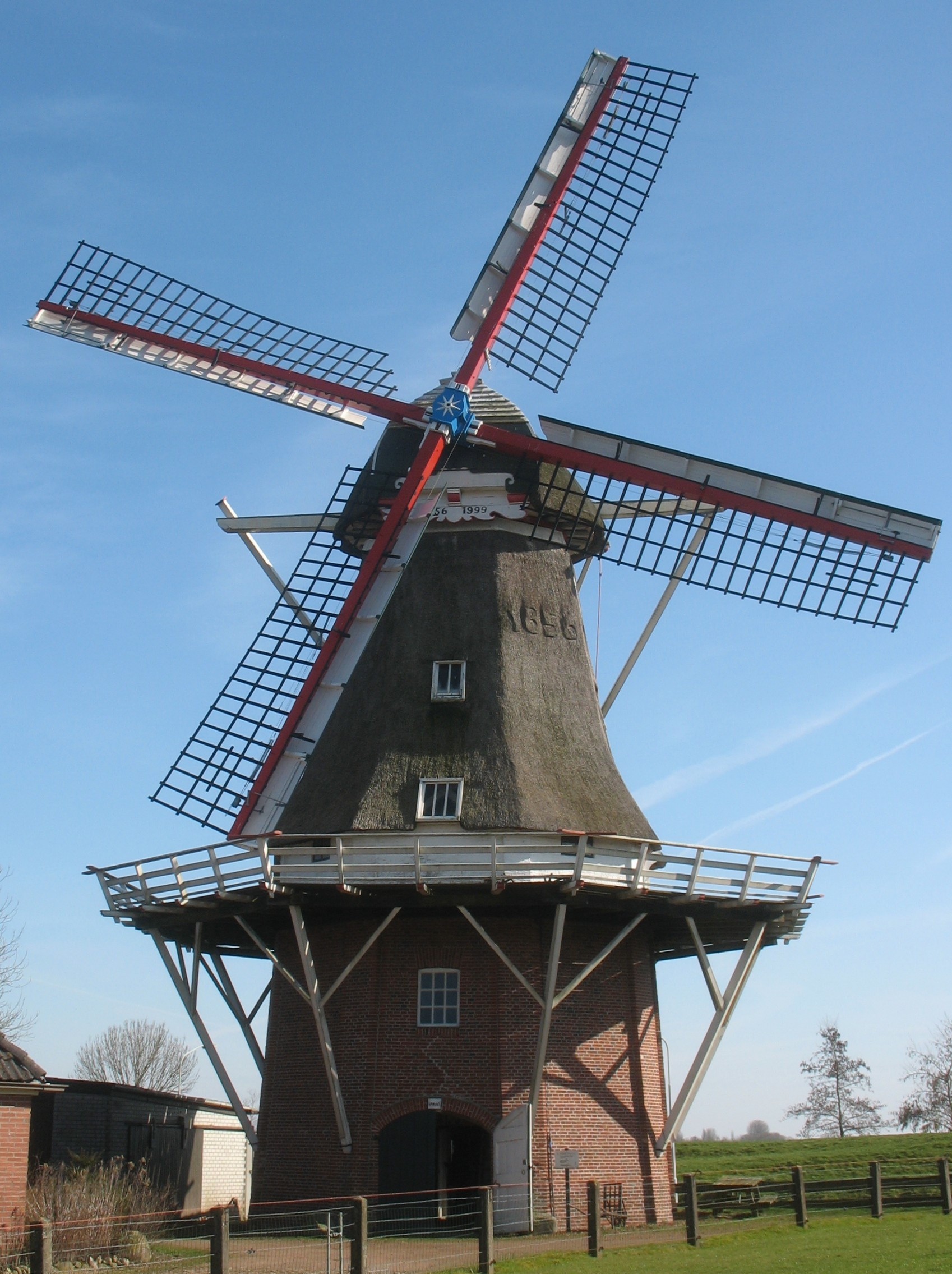 Dit is een foto van korenmolen, Rustroest, of ook wel de Munnekezeilstermolen, in Munnekezeil. De molen werd in 1856 gebouwd als koren- en pelmolen. Later is het pelwerk verwijderd. De molen is nu uitgerust met twee koppels stenen. Eén koppel stenen, op de steen zolder dat op windkracht aangedreven kan worden. En één koppel dat op een maalstoel beneden in de molen ligt, deze kan worden aangedreven door middel van een dieselmotor.